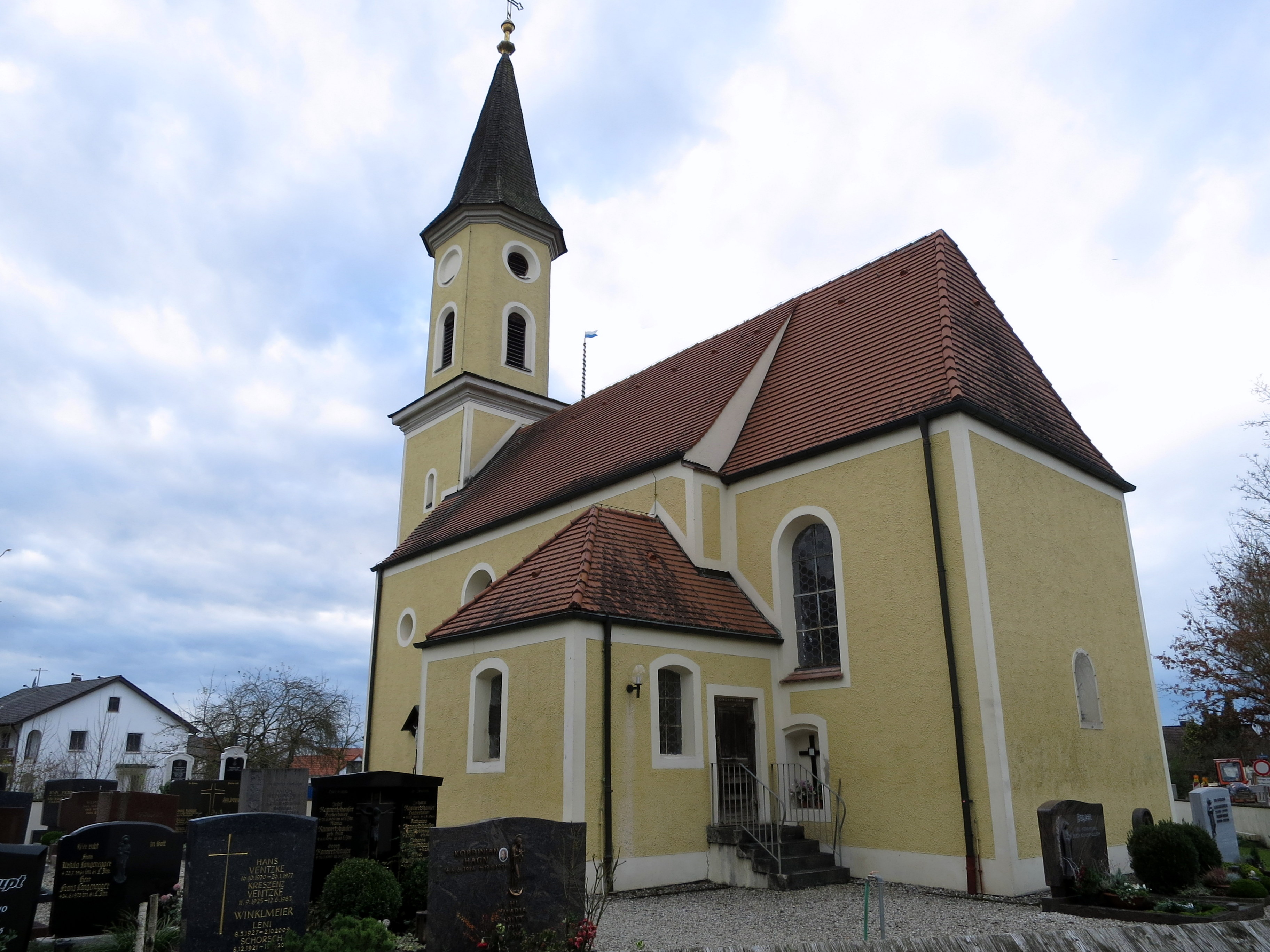 Kirche von der Chorseite